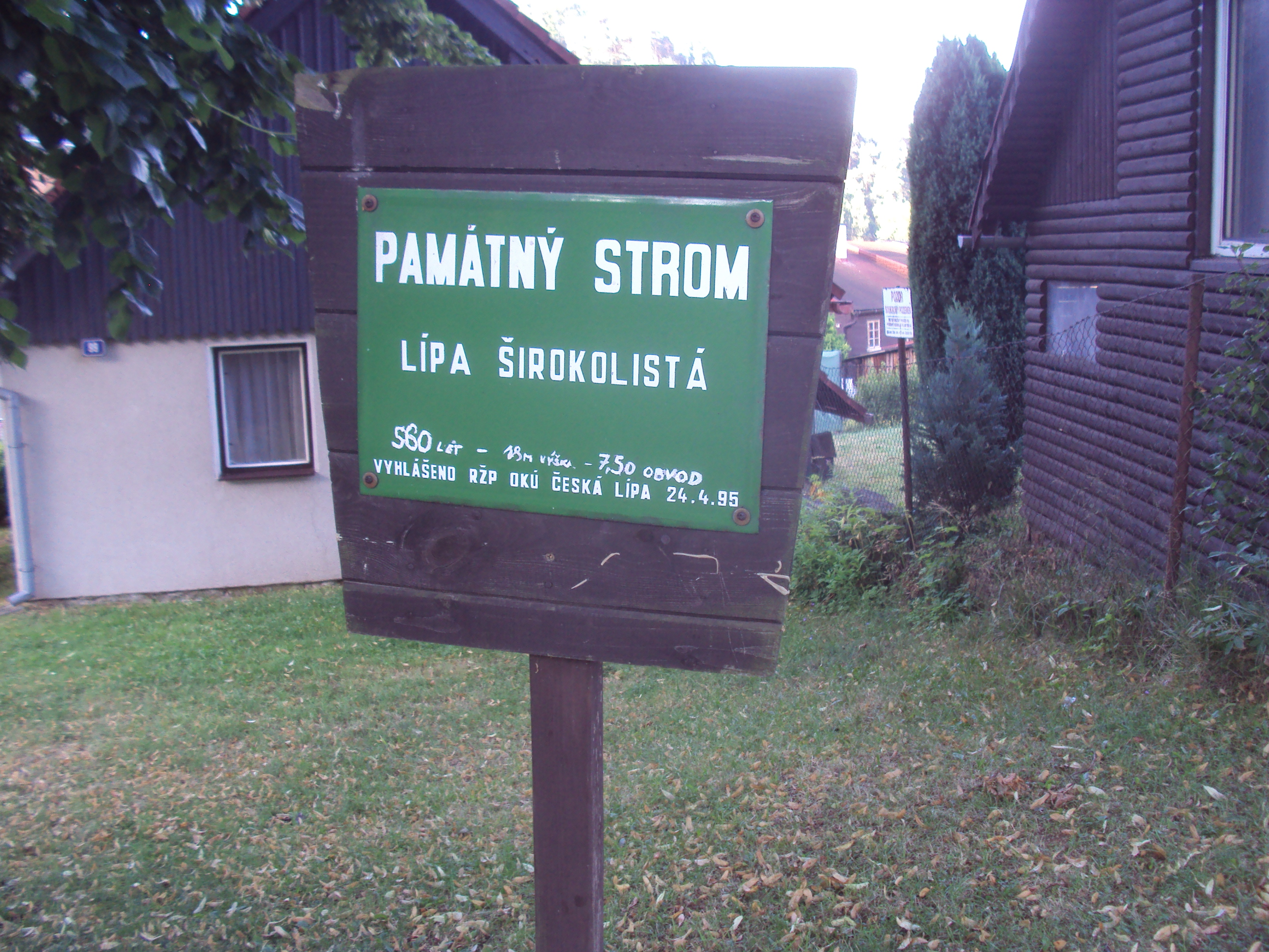 Česky: Tabulka s údaji u památné lípy